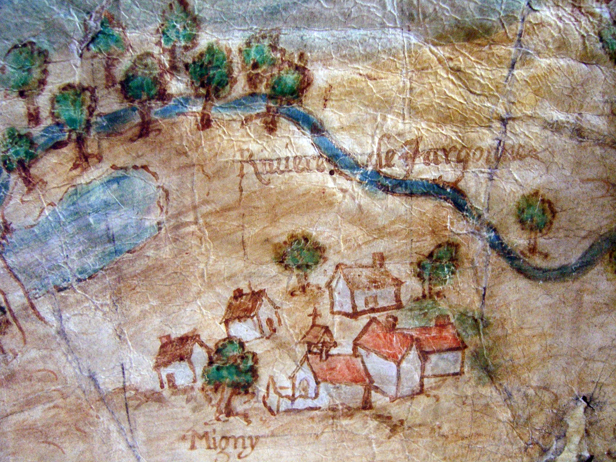 Vue du nord ; à l'arrière-plan, une fontaine-pièce d'eau et la Gergogne. Localité disparue, attenante à l'époque à Rosoy, mais sur Rouvres-en-Multien aujourd'hui.